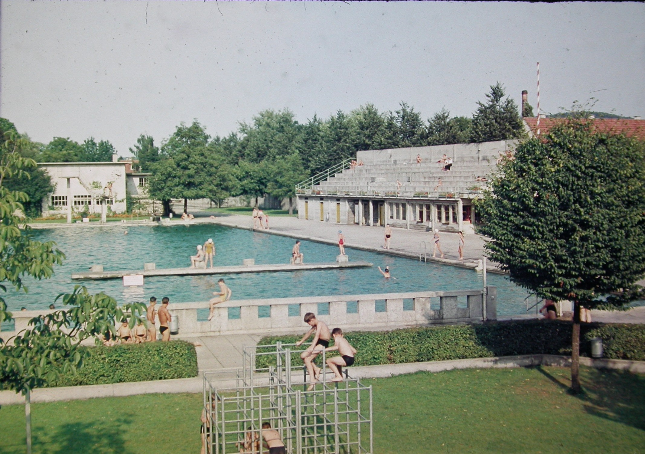 Freibad Geiselweid im Erscheinungsbild der 50er-Jahre